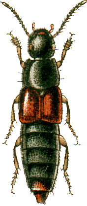 This file has been extracted from another file: Jacobs14.jpg